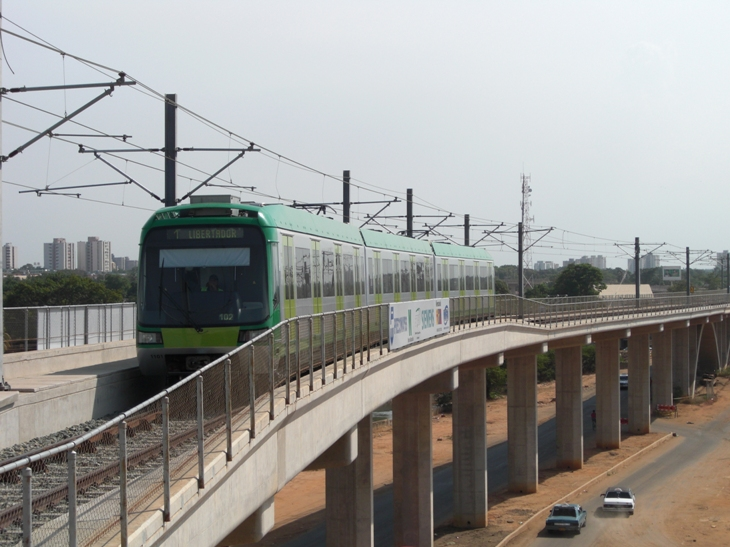 Metro de Maracaibo, Estado Zulia, Venezuela